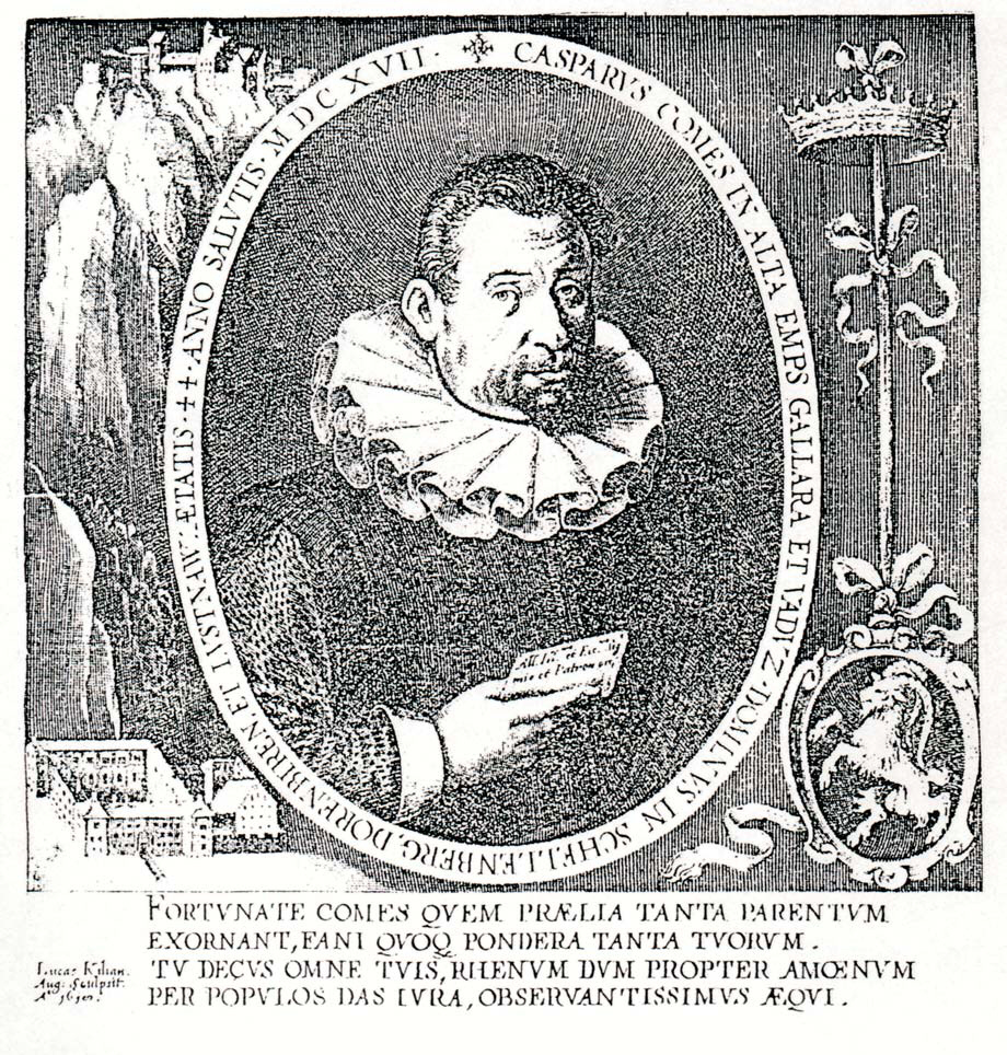 Portrait Kaspar von Hohenems